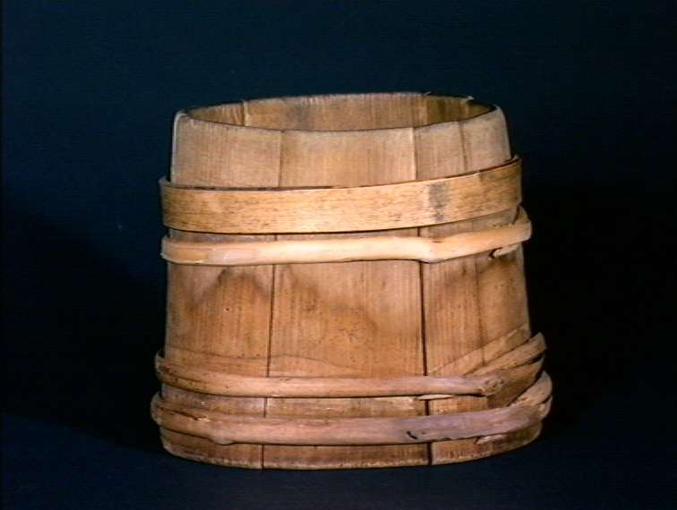 Lagget snik med staver av furu og bånd av bjørk fra Voss i Hordaland. Høyde 15 cm. Foto Anne Lise Reinsfelt / Norsk Folkemuseum